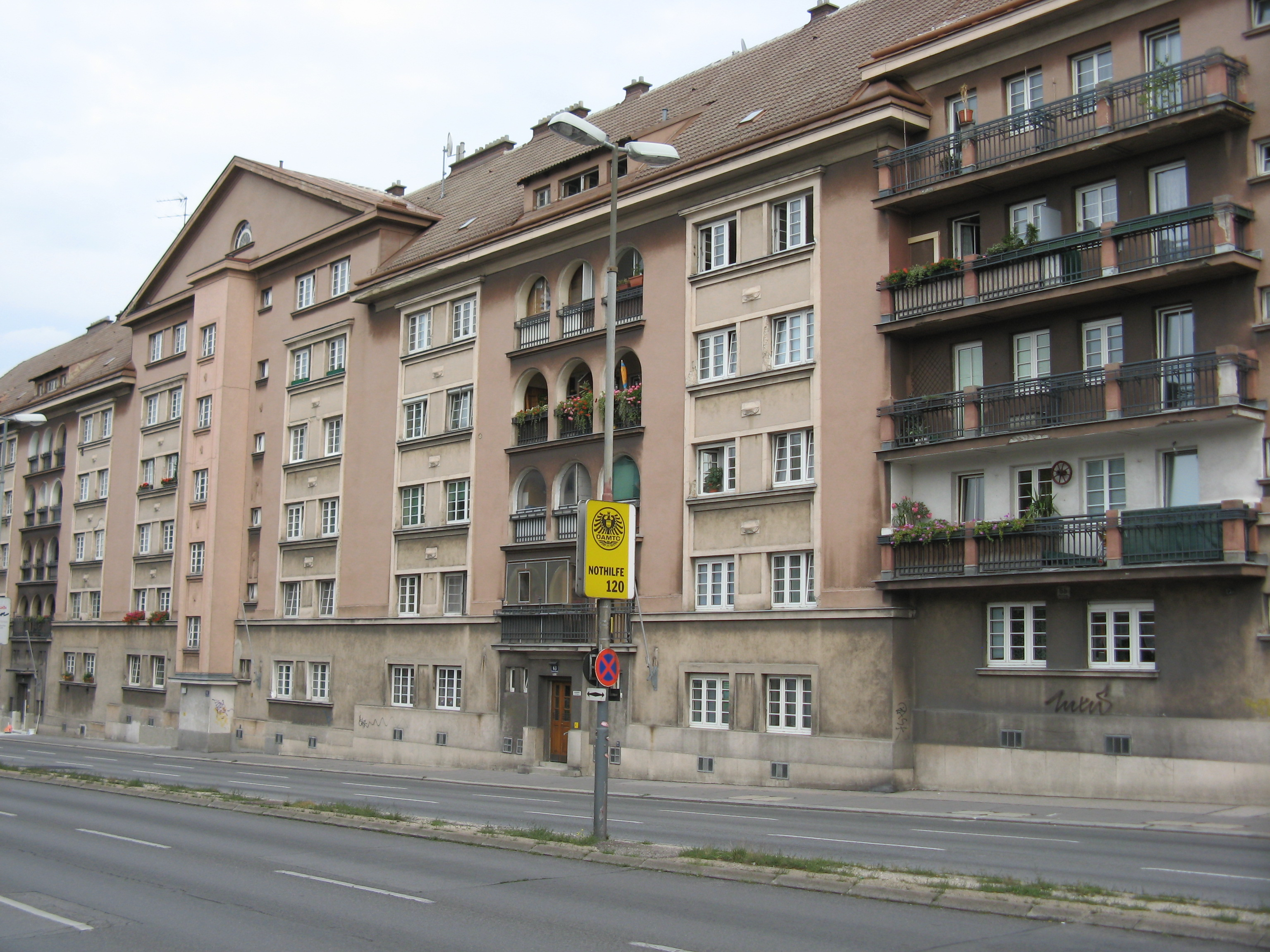 Wohnhausanlage Victor-Adler-Hof (1923-24) von Engelbert Mang in Wien-Favoriten